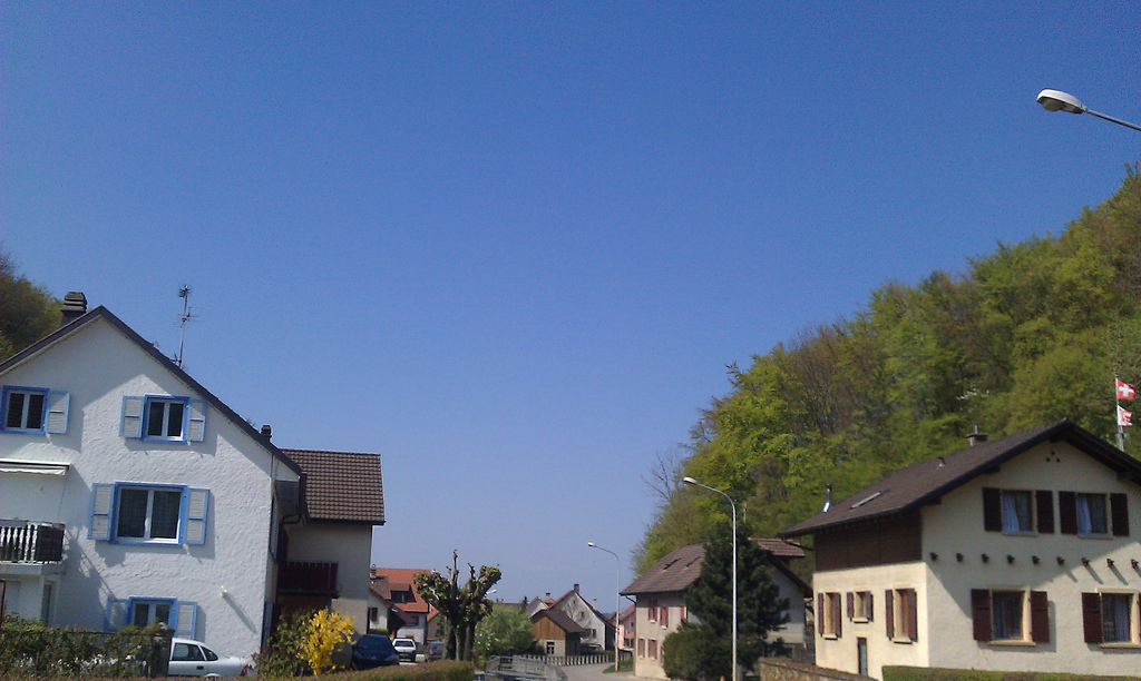 Cornol, haut du village.